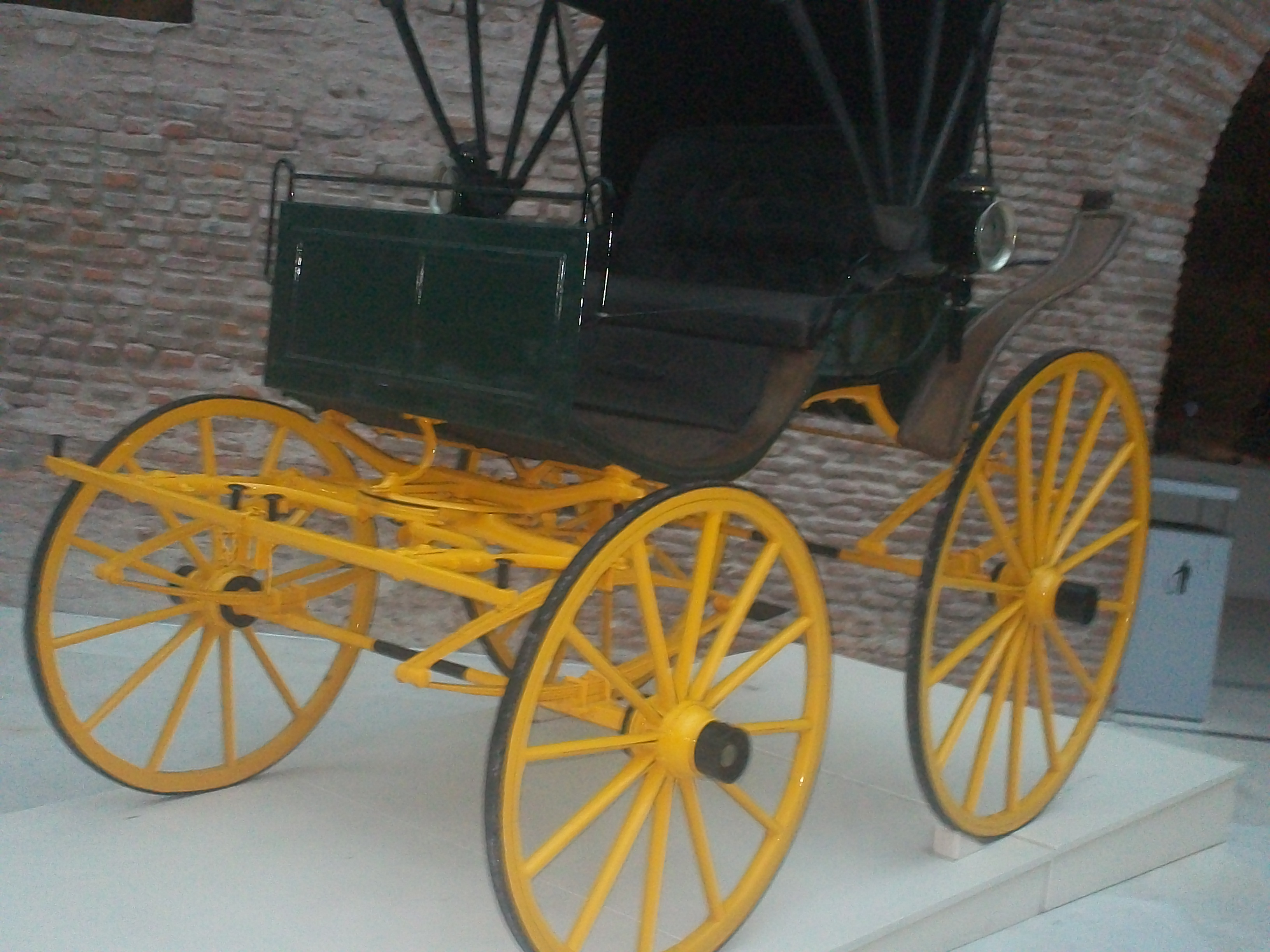 Carreta particular utilizada por el presidente Uriburu expuesta en el Museo del Bicentenario.